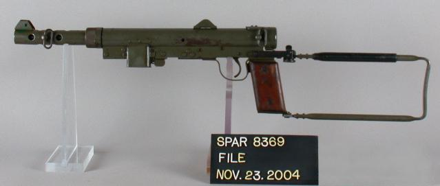 Carl Gustav M/45